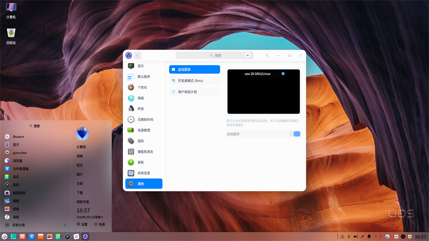 中文（中国大陆）: UOS操作系统的界面截图。